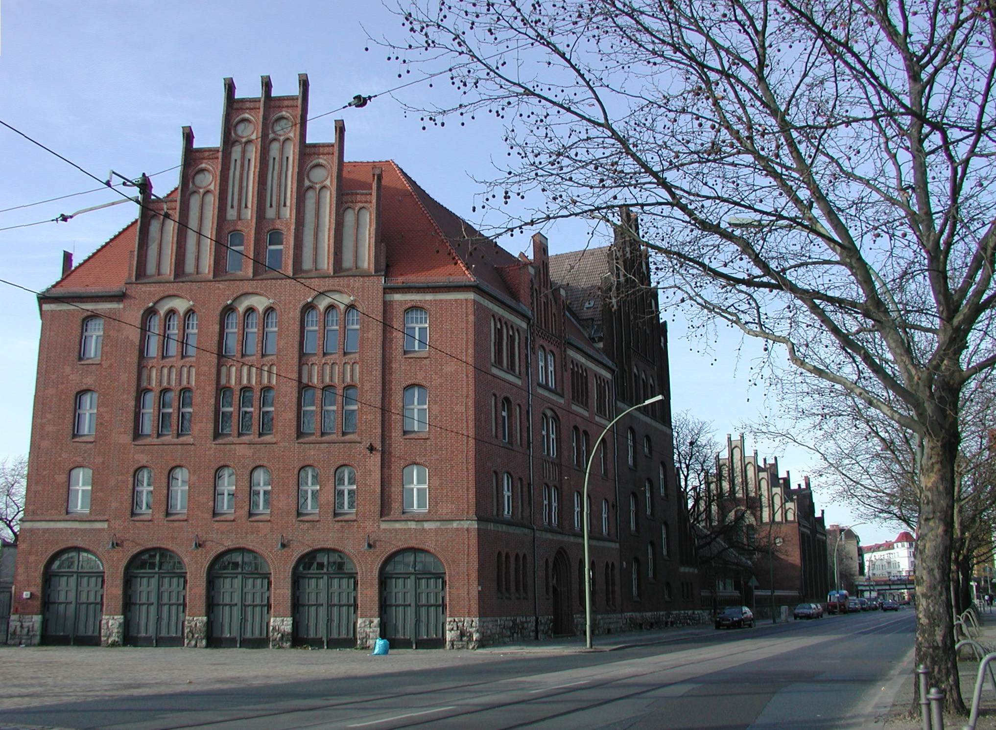 ehemalige Feuerwache, heute Polizeirevier in der Marktstraße